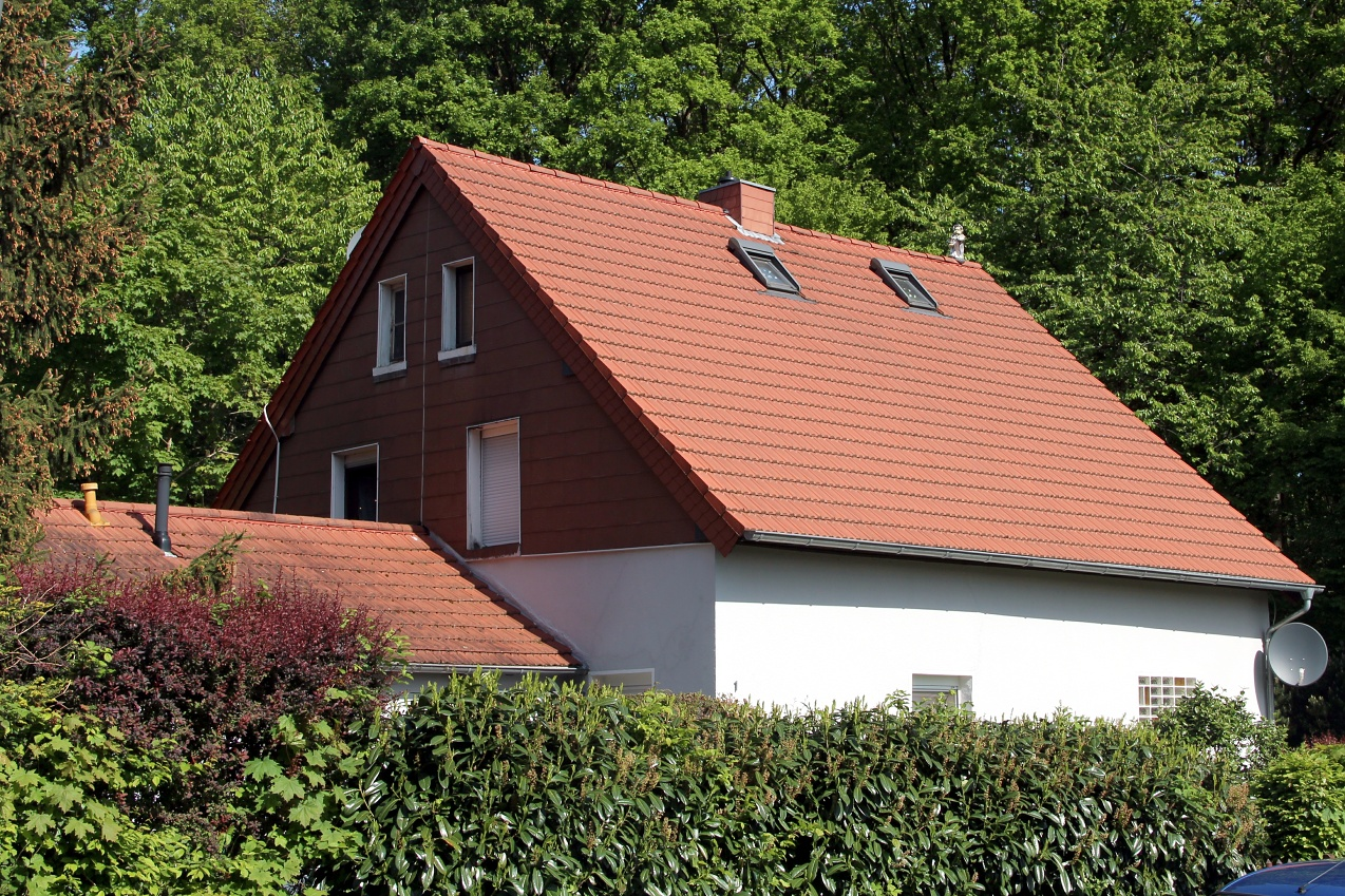 ehemaliges Pförtnerhaus des frühren Pasteurschachtes